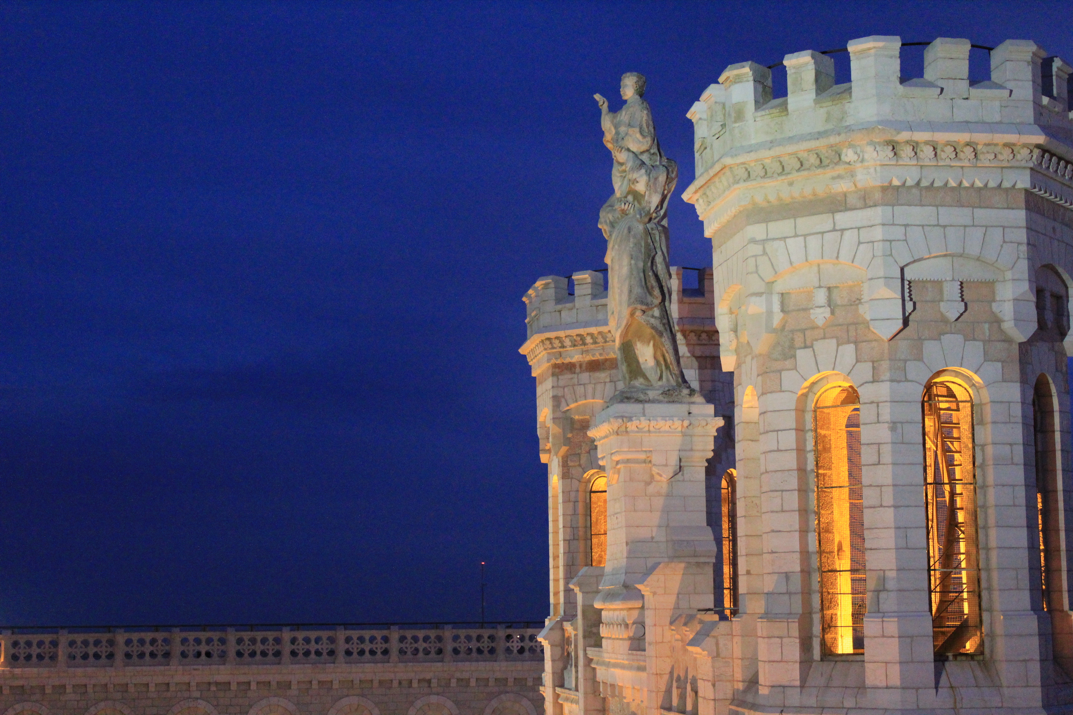 אכסניית נוטרדאם דה פרנס היא מבנה סמוך לכיכר צה"ל, שנבנה על ידי הרוזן הצרפתי מרי דה פְּייֶלָא, כחלק ממכלול מבנים ובהם בית חולים ושני מנזרים. שימש לאירוח צליינים, ומ-1970 שימש כמעונות סטודנטים. כיום משמש מלון, מנזר נוטרדאם דה ג'רוזלם. המבנה גבוה וסימטרי, וכולל קפלה במרכז ושני אגפים ממערב וממזרח. מעל הקפלה שני מגדלים בסגנון הבארוק, וביניהם פסל מריה אוחזת בישו התינוק.